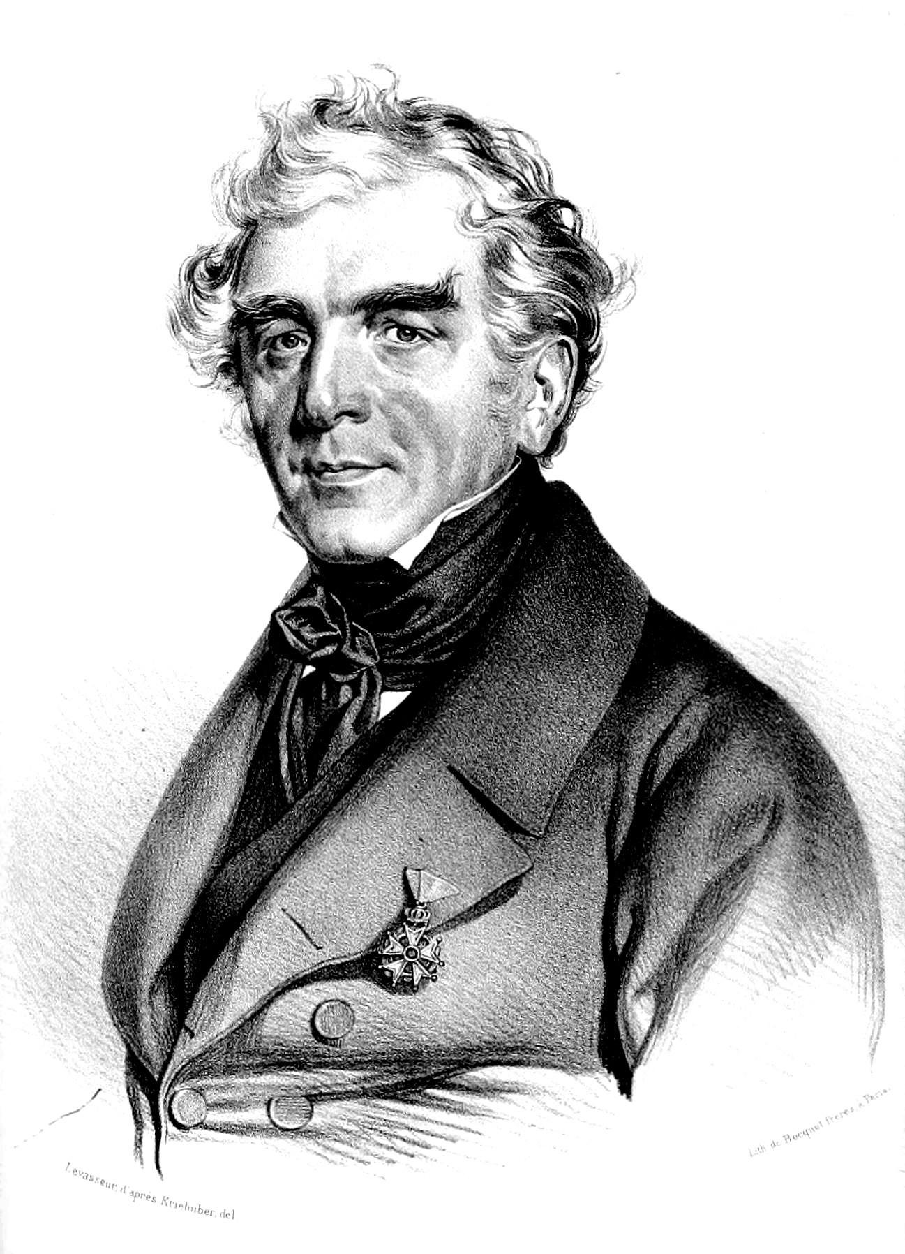 Konstanty Tyzenhauz 1786-1853